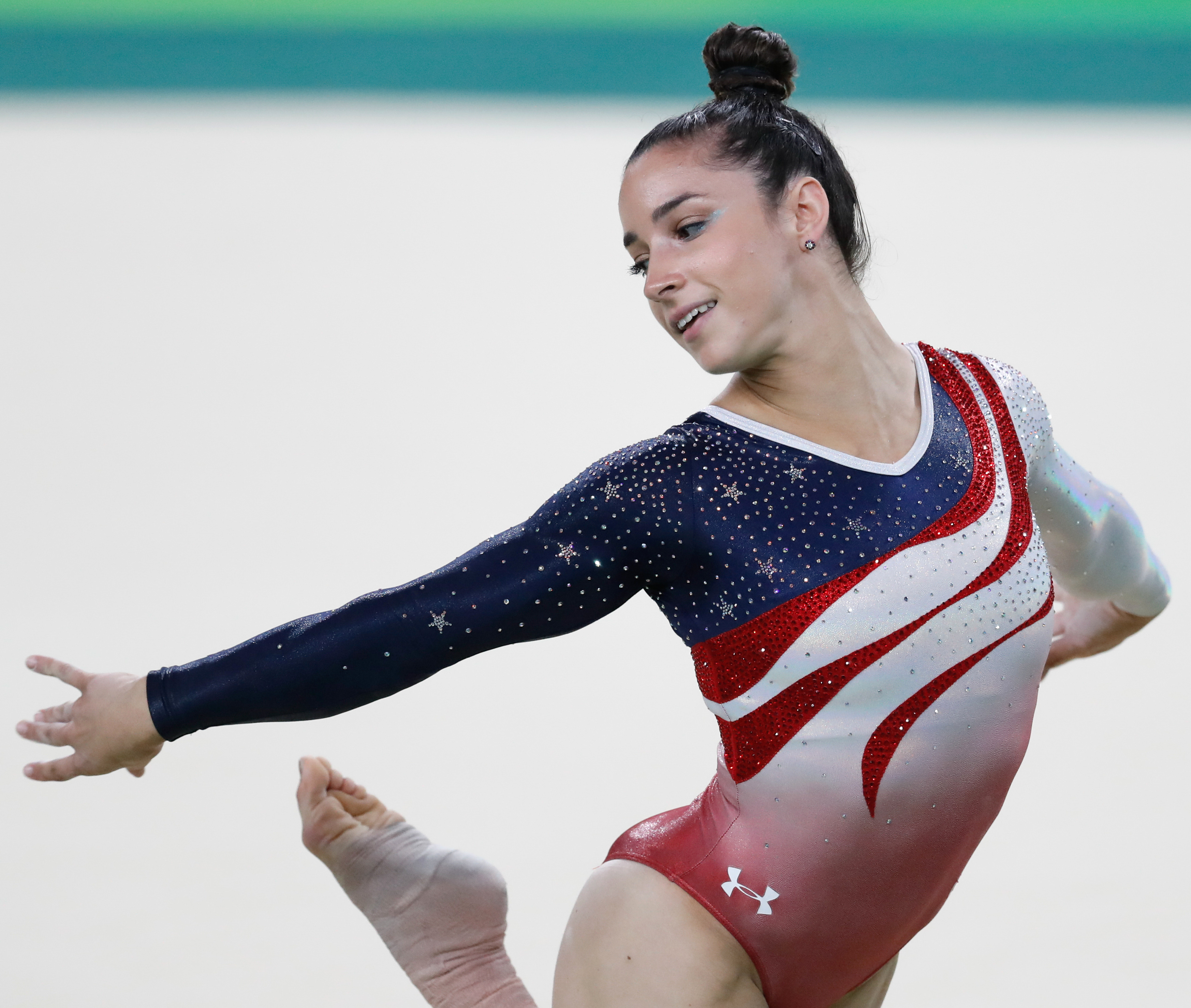 Rio de Janeiro - Aly Raisman, ginasta dos Estados Unidos, durante final em que levou medalha de ouro na disputa por equipes feminina nos Jogos Olímpicos Rio 2016. (Fernando Frazão/Agência Brasil)